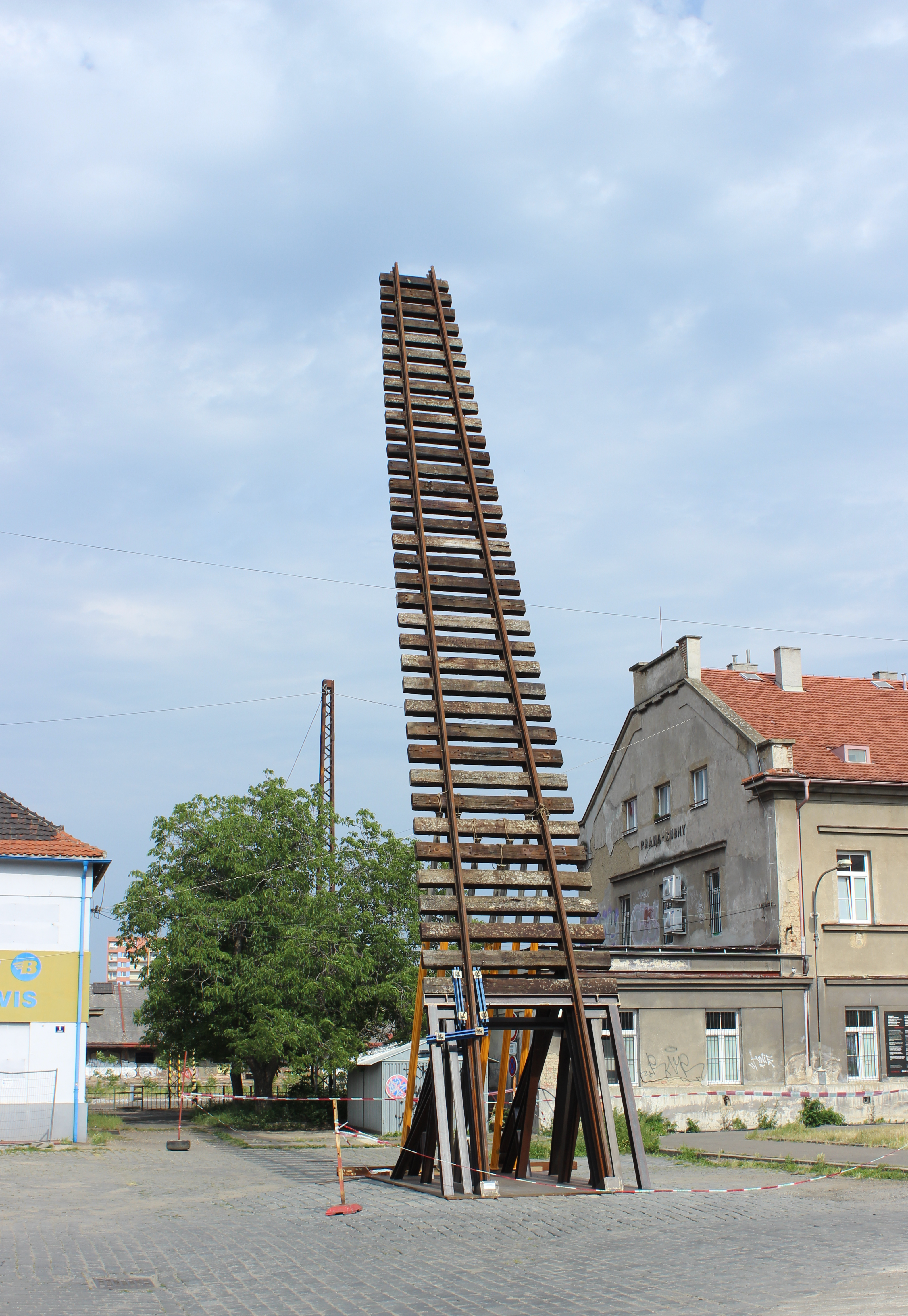 Skulptura Brána nenávratna v Praze u nádraží Praha-Bubny. Project: Fotíme Česko